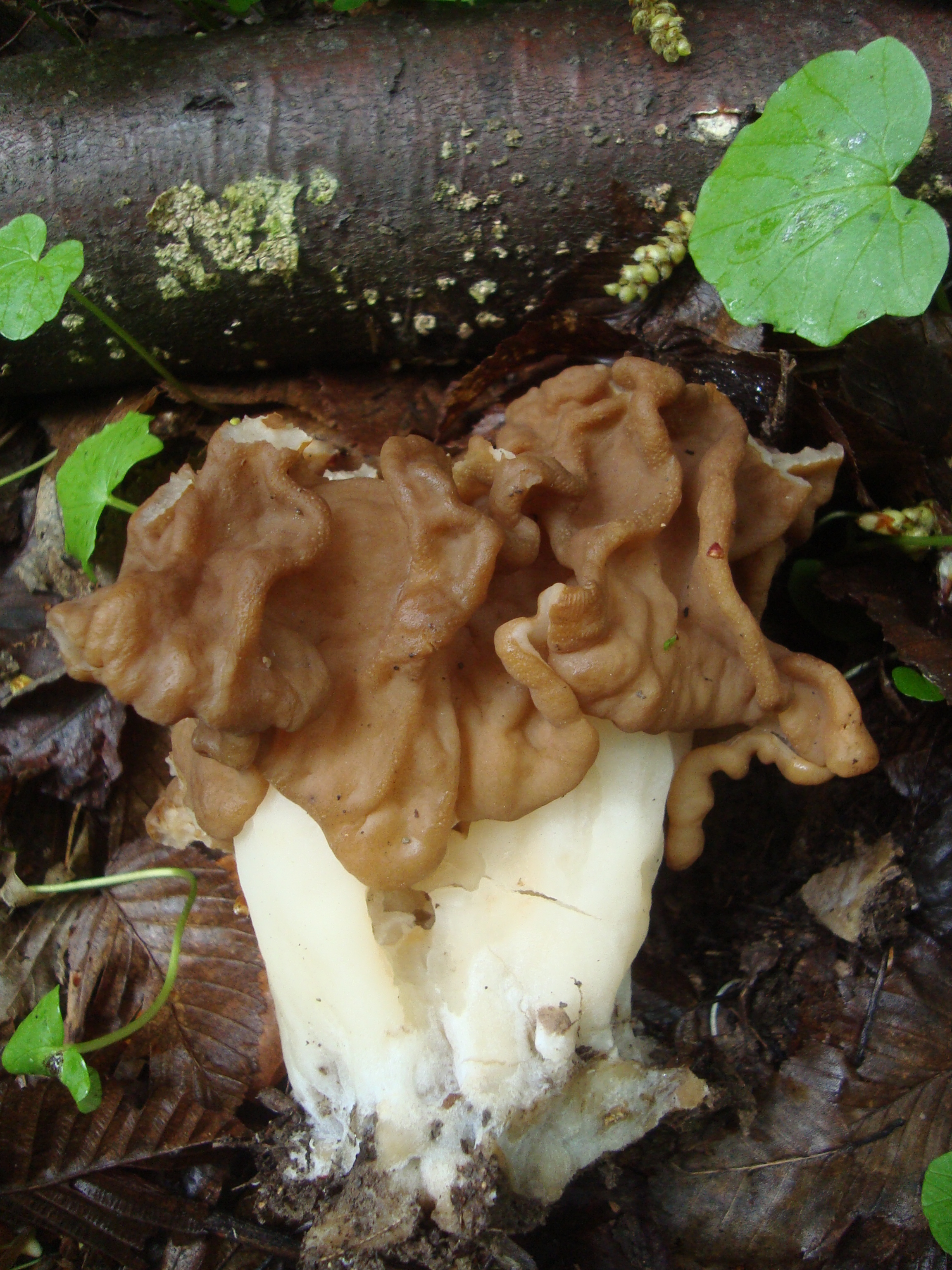 ucháč velký z Podkomorských lesů, Česká republika, jižní Morava